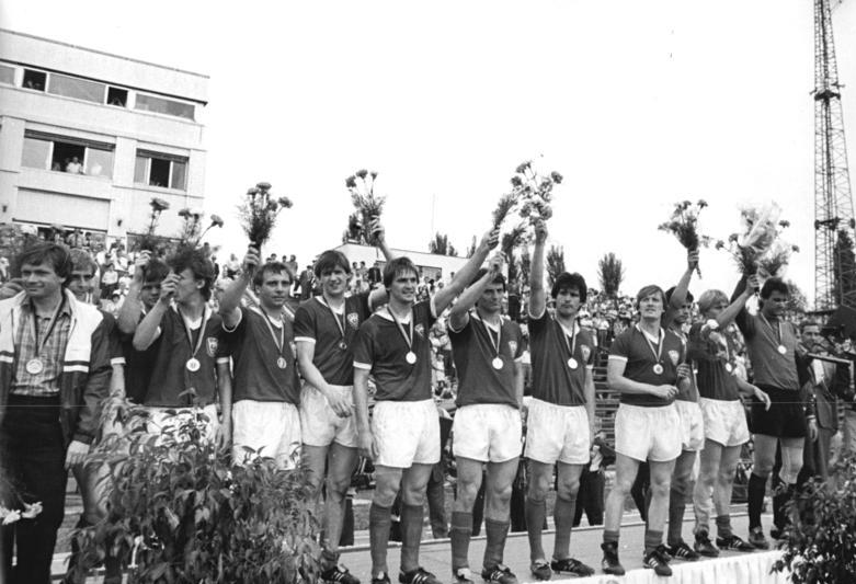 ADN-ZB-Mittelstädt-19.5.84-ma-Berlin: Fußball-Oberliga. Meisterehrung für den BFC Dynamo im Berliner Jahn-Sportpark. Nach der Oberliga-Begegnung gegen den 1. FC Lok Leipzig (0:2) nahm der sechsmalige Titelträger um Kapitän Bodo Rudwaleit (rechts) die Goldmedaillen für die Erringung des DDR-Meistertitels entgegen.